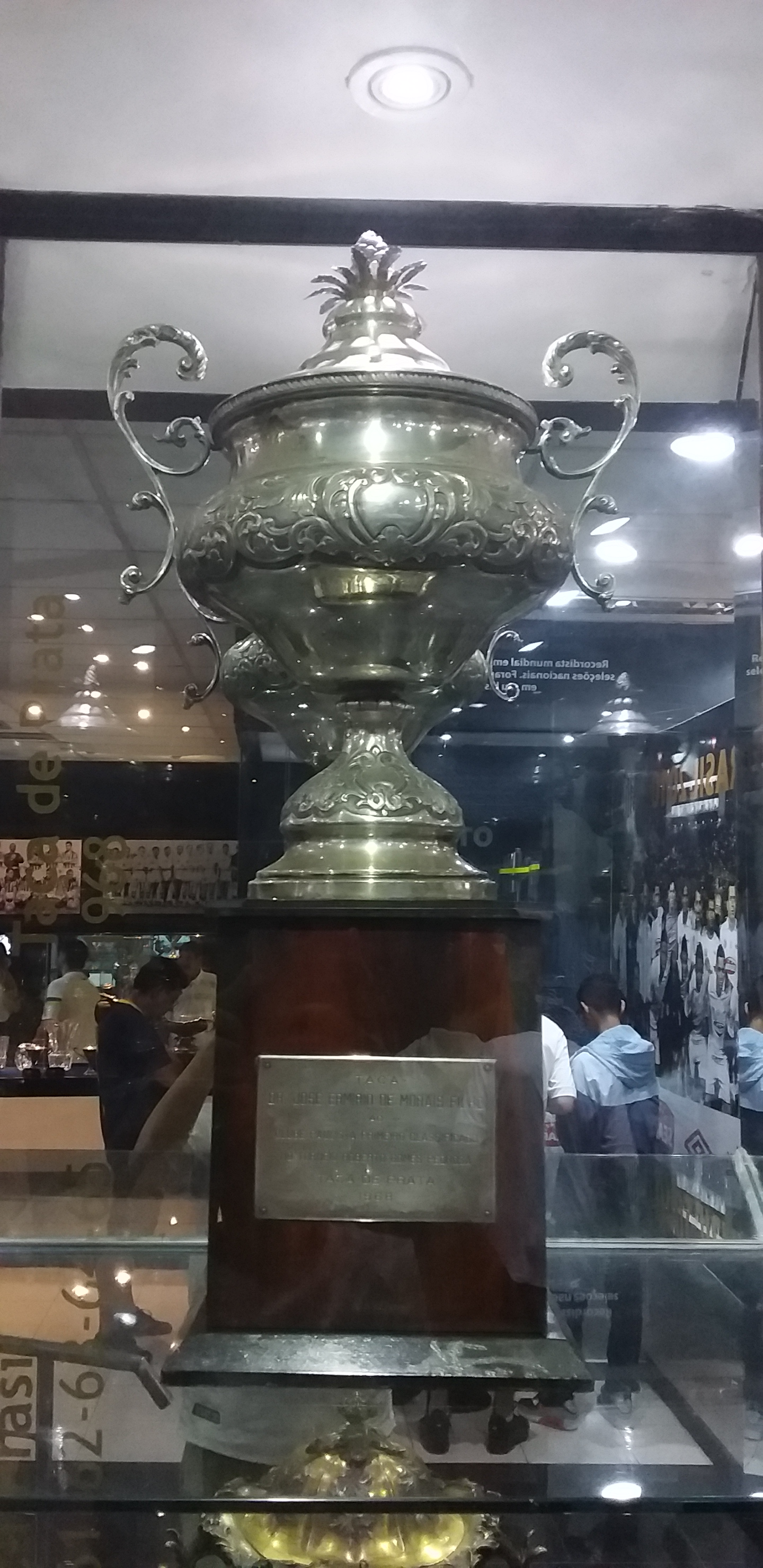 Troféu Taça de Prata conquistada pelo Santos FC exposto no Memorial das Conquistas